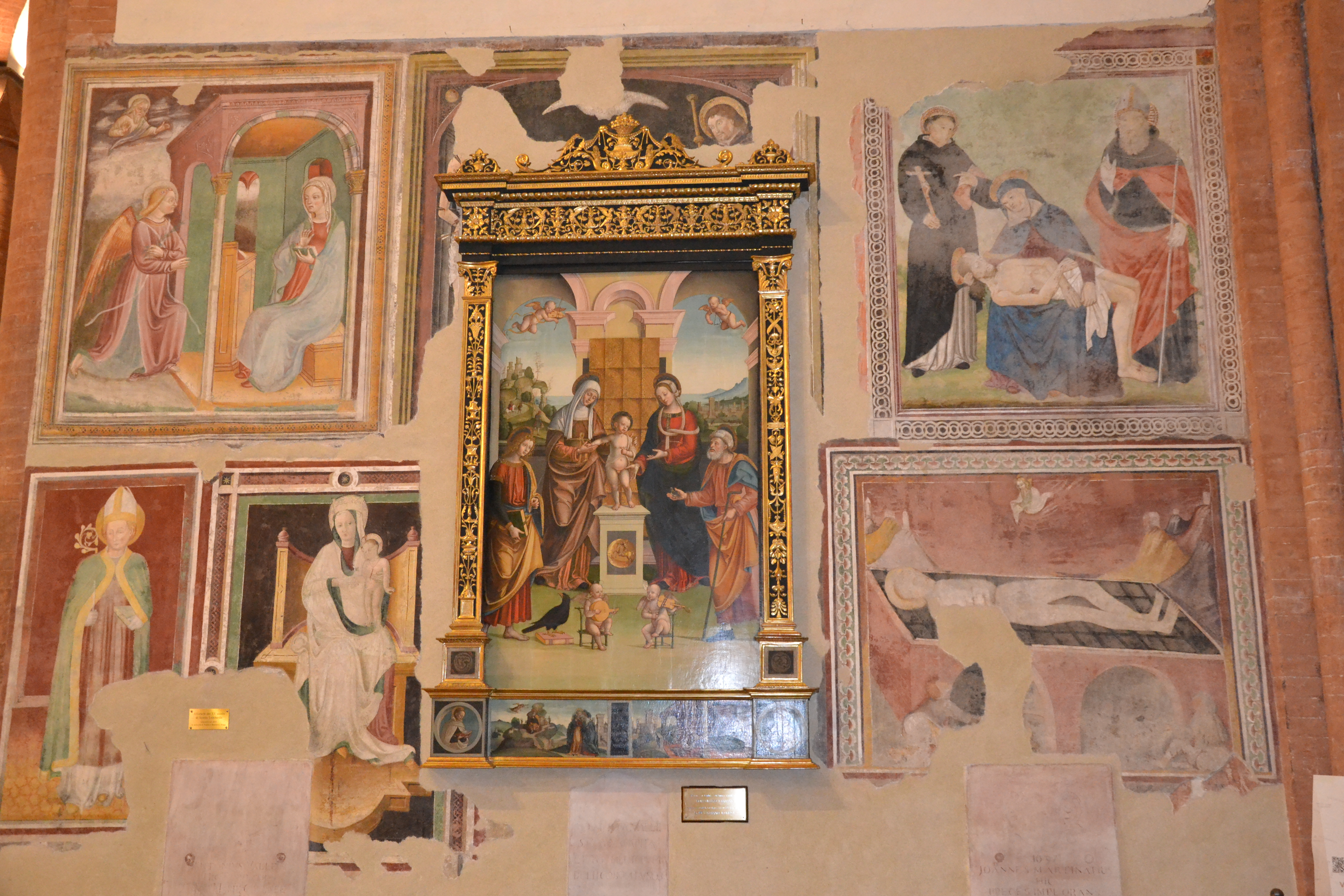 Chiesa di Santa Maria del Carmine (Pavia)